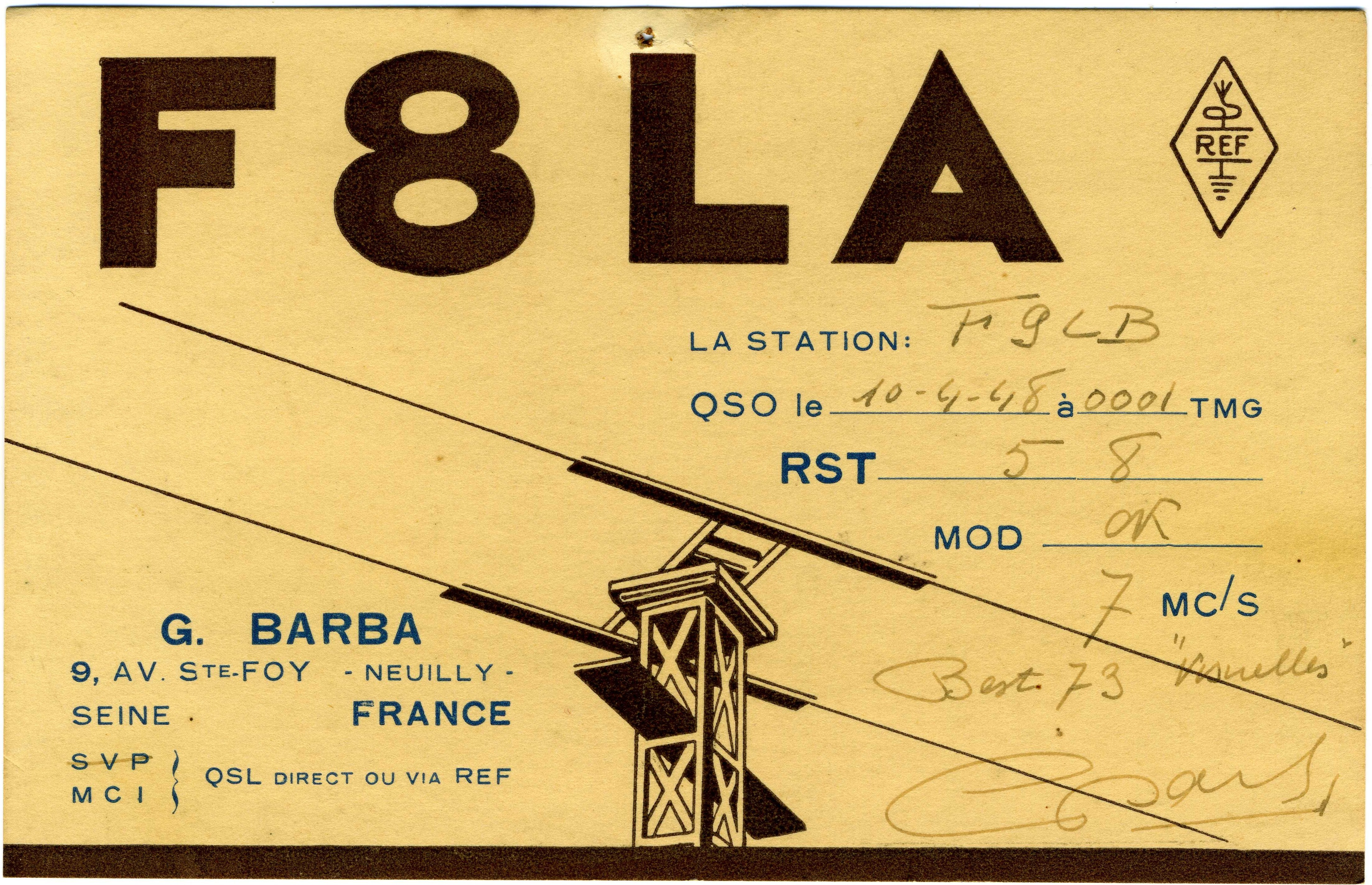 Carte QSL de F8LA (France) envoyée à F9LB (France), avril 1948.